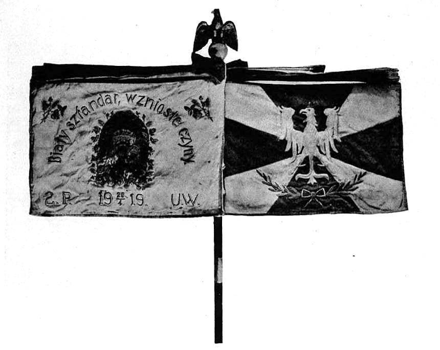 Sztandar 16 Pułku Ułanów Wielkopolskich (przed 1934)